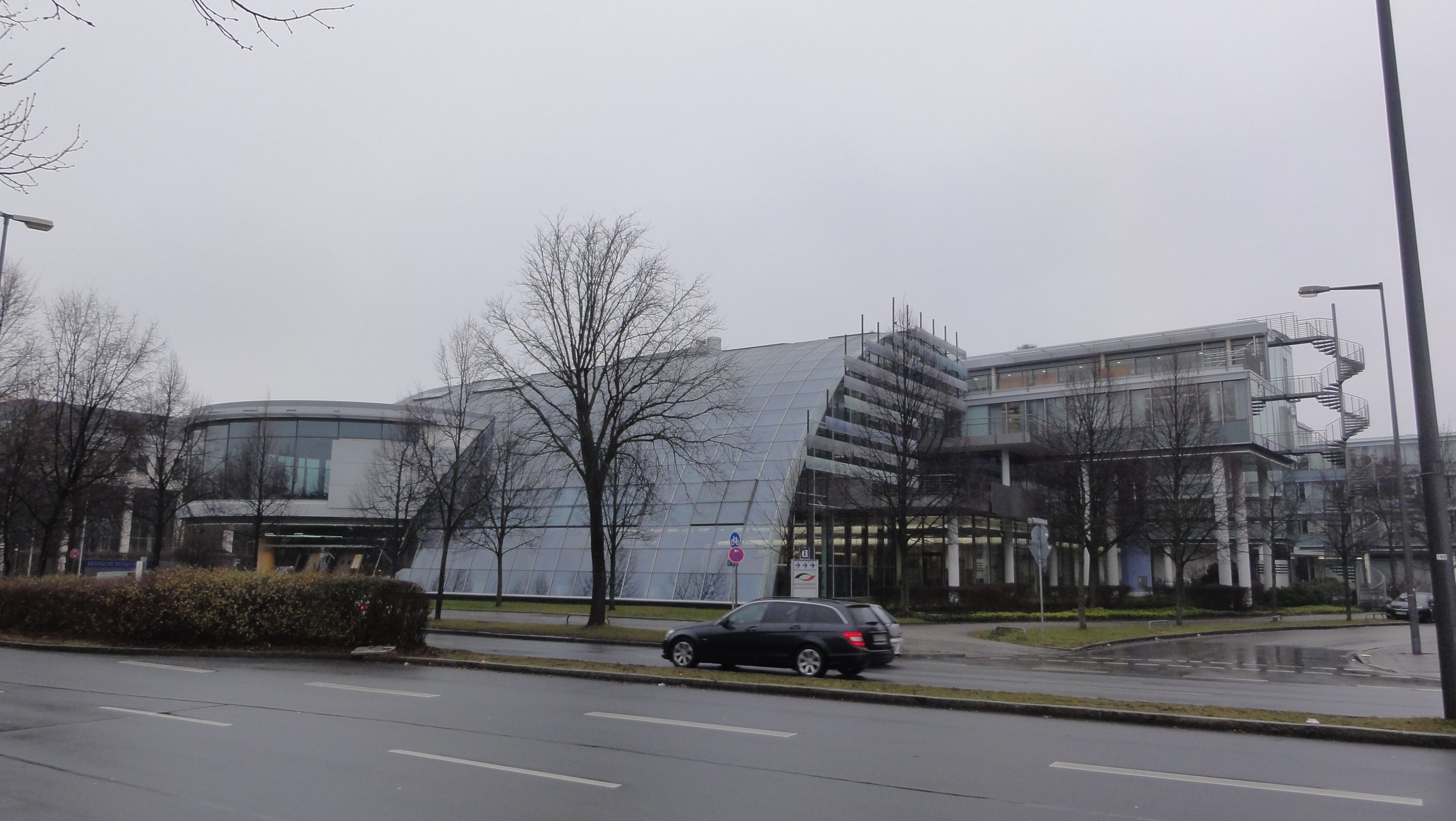 Munich — Leopoldstraße 234